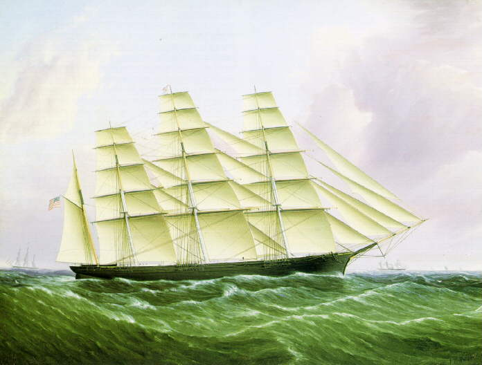 Viermast-Klipperbark Great Republic